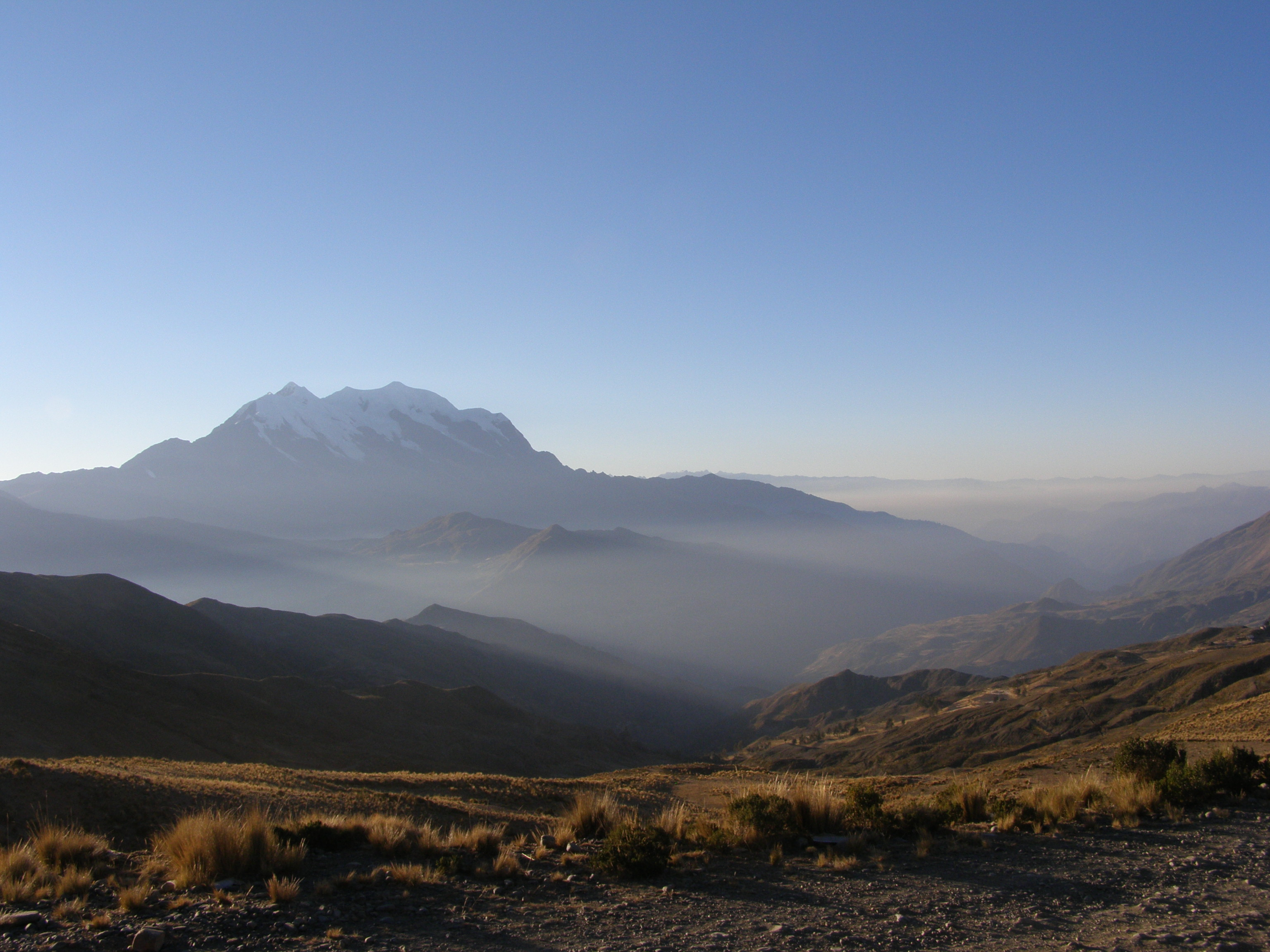 eigen werk